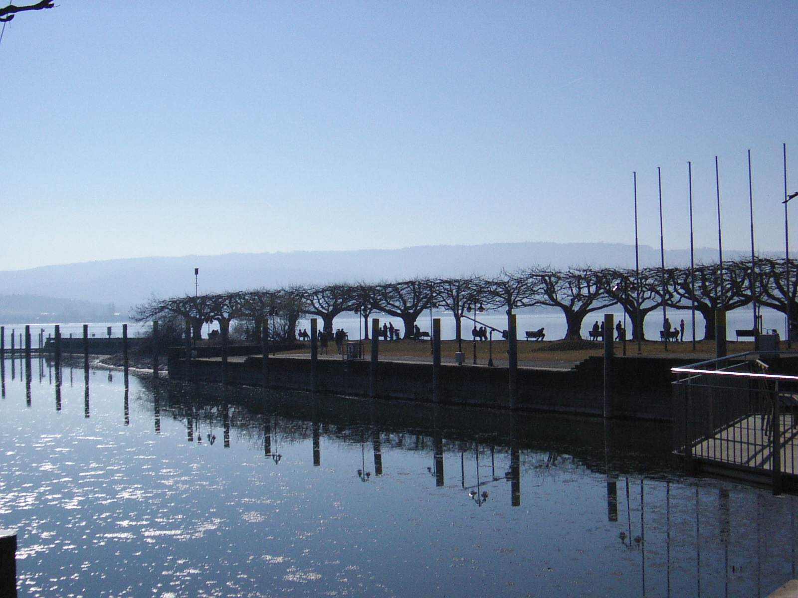 Hafen in Radolfzell